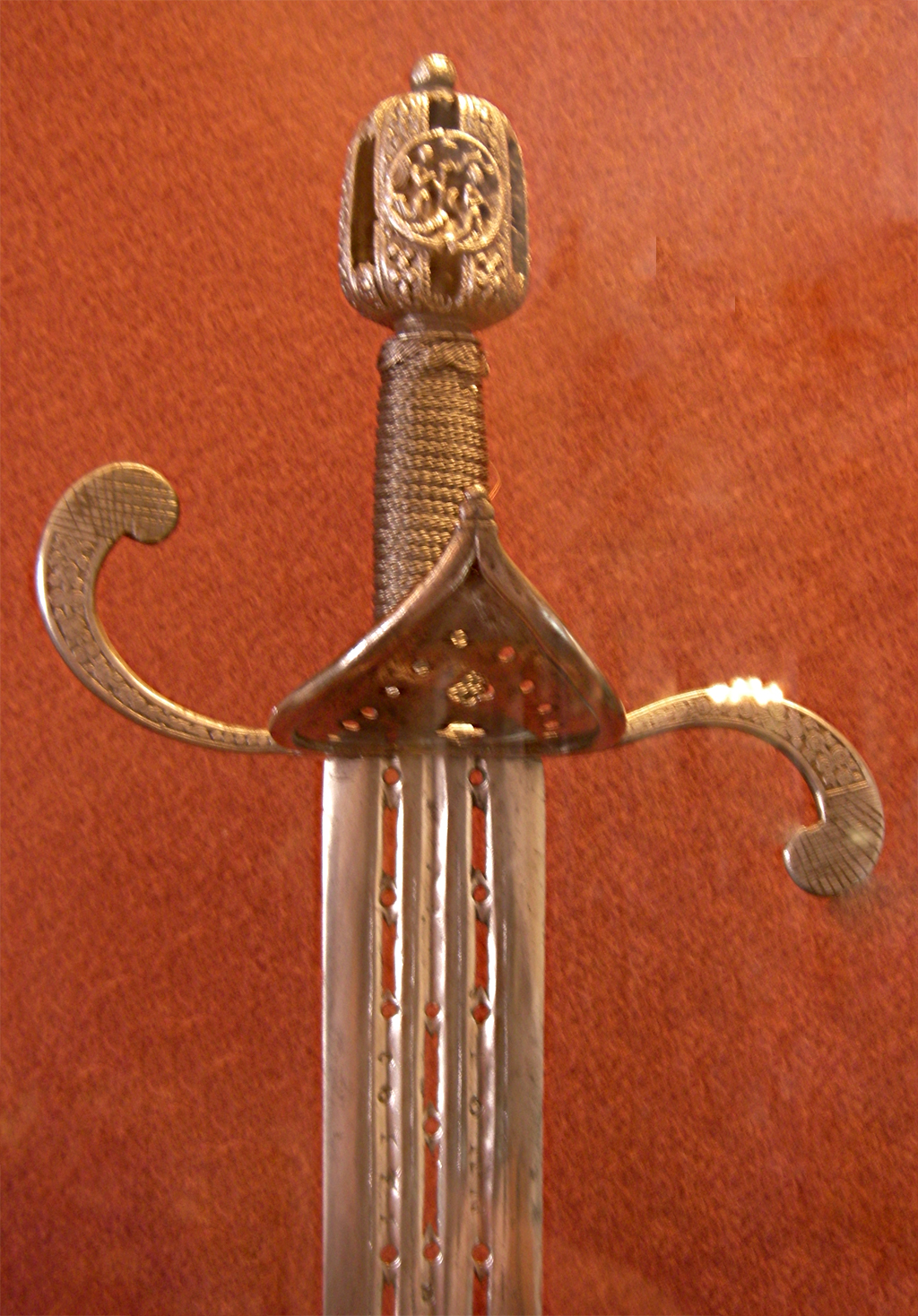 Меч (гарда). Толедо, Мастер Хуан де Аскойтийя, первая половина XVI в. Эрмитаж, Санкт-Петербург. see Image:Меч испания 16в.jpg.